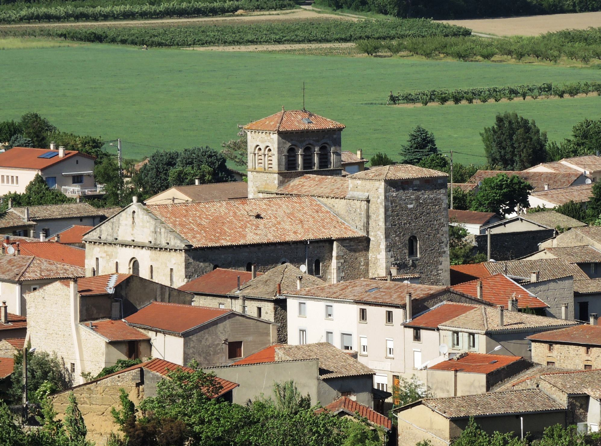 Champagne (Ardèche) détail